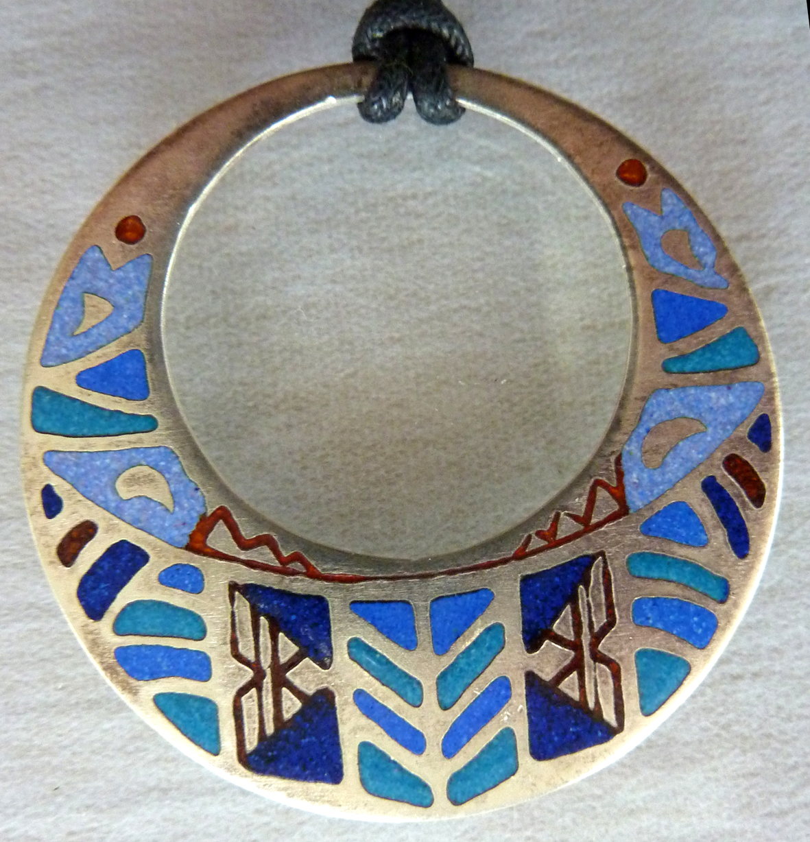 sieraad van Michèle Gilbert : koper met emaille champlevé verzilverd